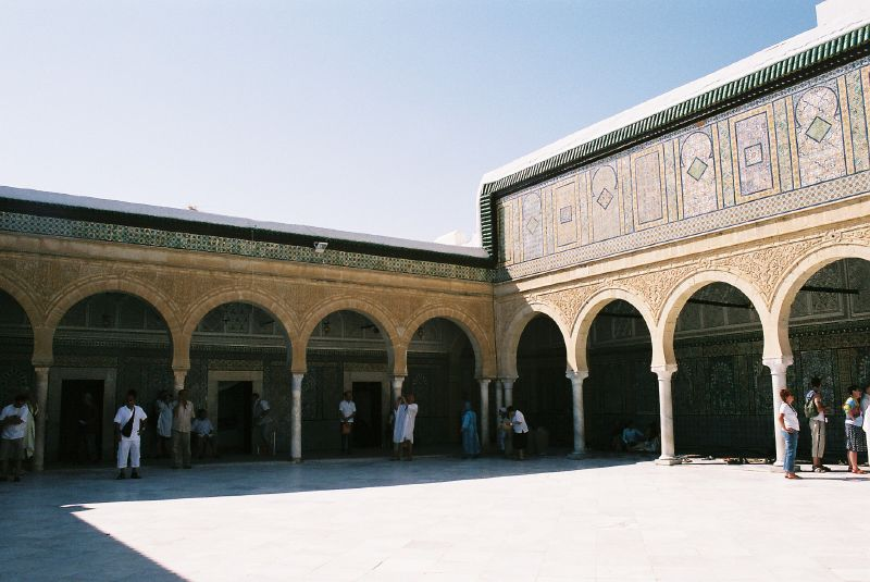 The Barber's Mausoleum, Kairouan, Tunisia.